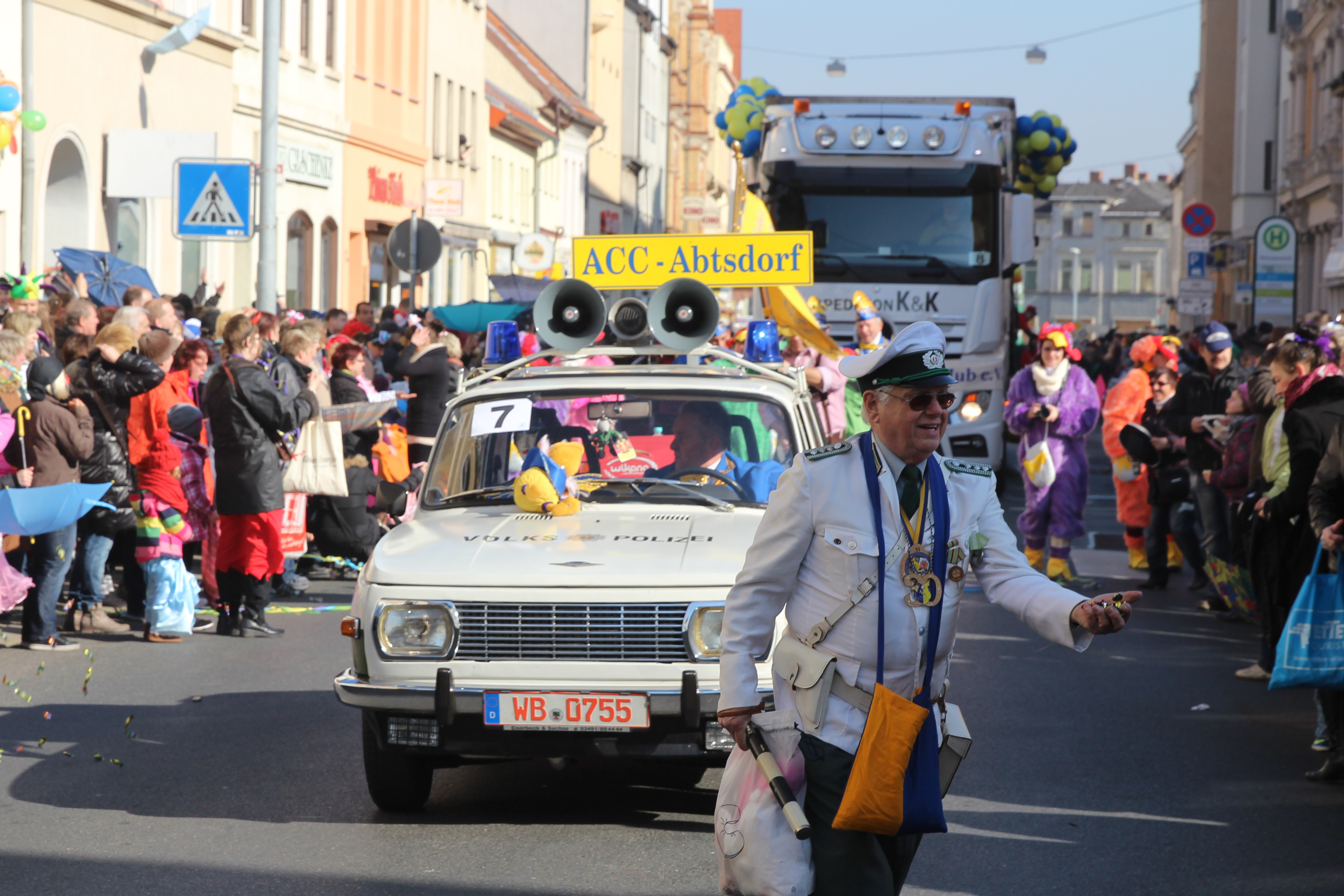 Rosenmontagsumzug in Köthen (Anhalt). Polizei-Wartburg des ACC Abtsdorf.